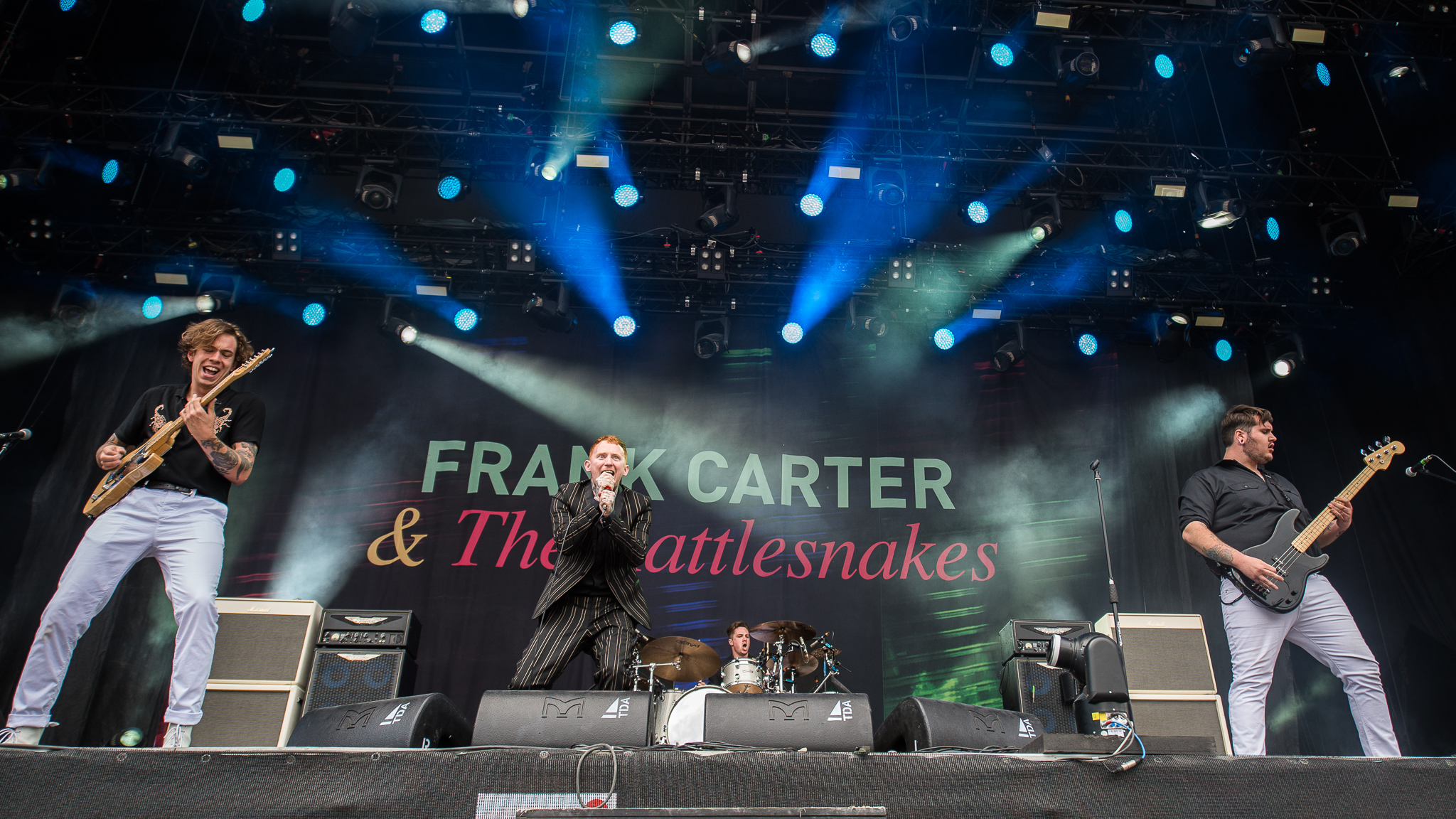 ARGO-Konzerte,Beck's Park Stage,Dean Richardson,Frank Carter,Frank Carter & The Rattlesnakes,Gareth Grover,Konzert,Livekonzert,Livemusik,Musik,RiP,Rock im Park 2017,Tom 'Tank' Barclay